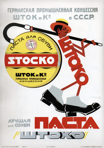 Александр Зеленский. Плакат «Лучшая для обуви паста Штоко». 1929, 69,5x50